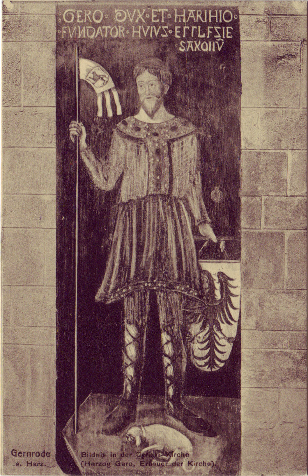 Alte Ansichtskarte